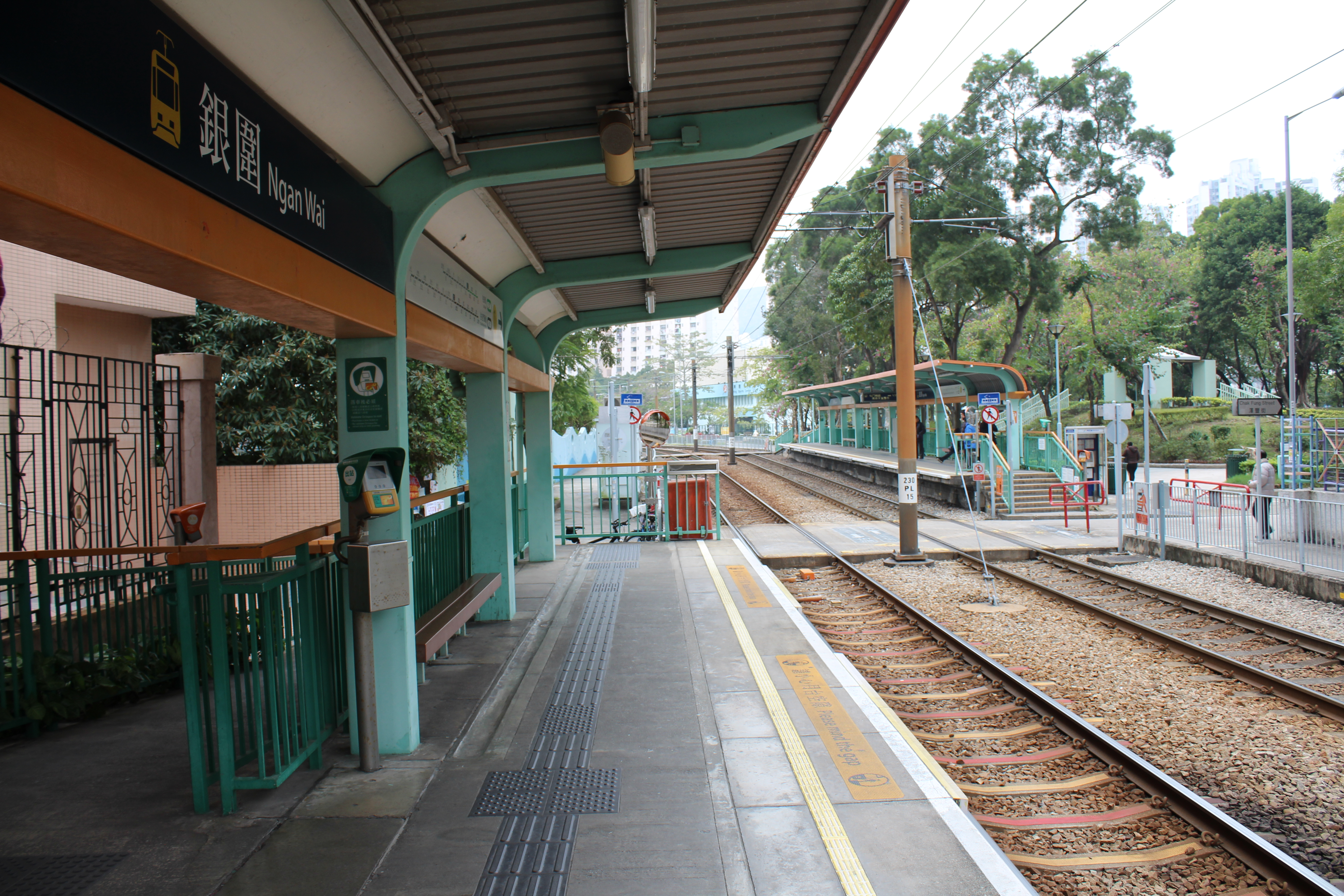 銀圍站月台